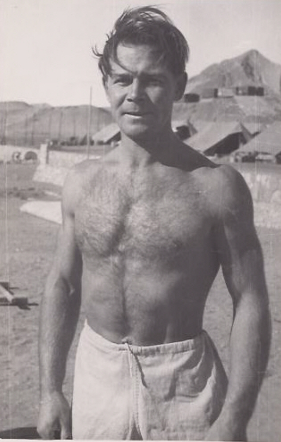 Kurt Domke war von 1945 bis 1947 in englischer Gegangenschaft.